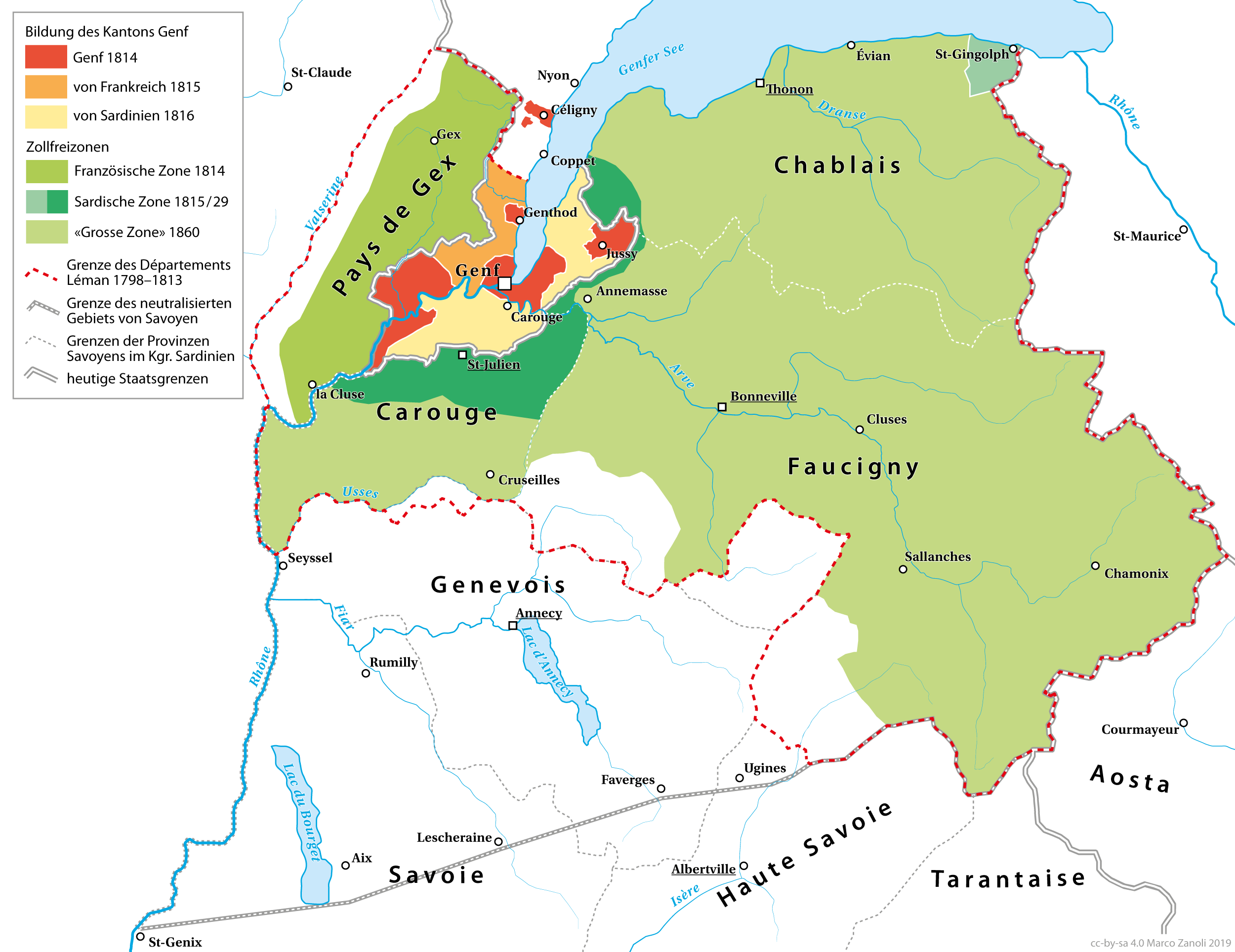 Karte zur Entstehung des Kantons Genf 1814-1817 und der Zollfreizonen um Genf bis 1860